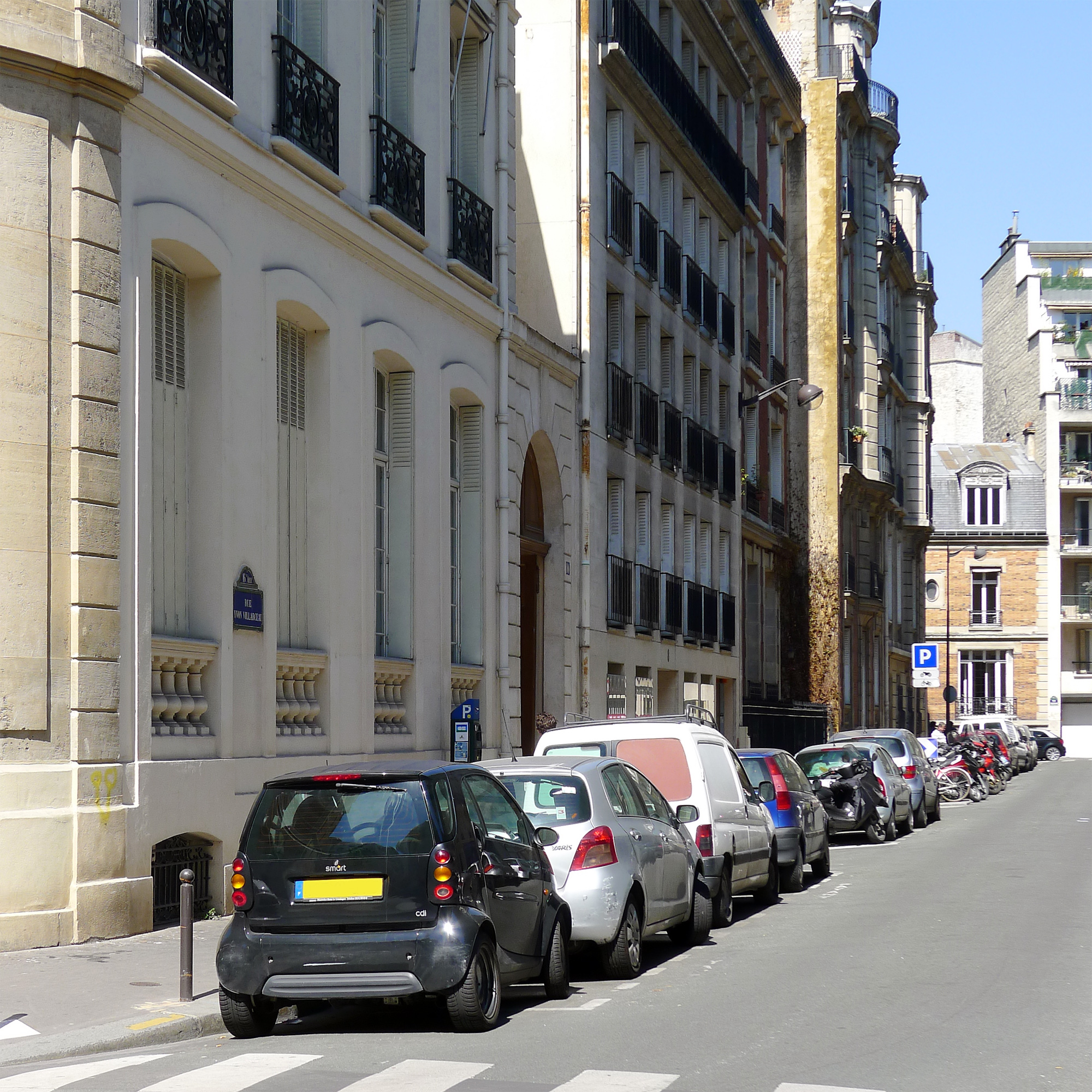 Rue Yvon-Villarceau - Paris XVIe